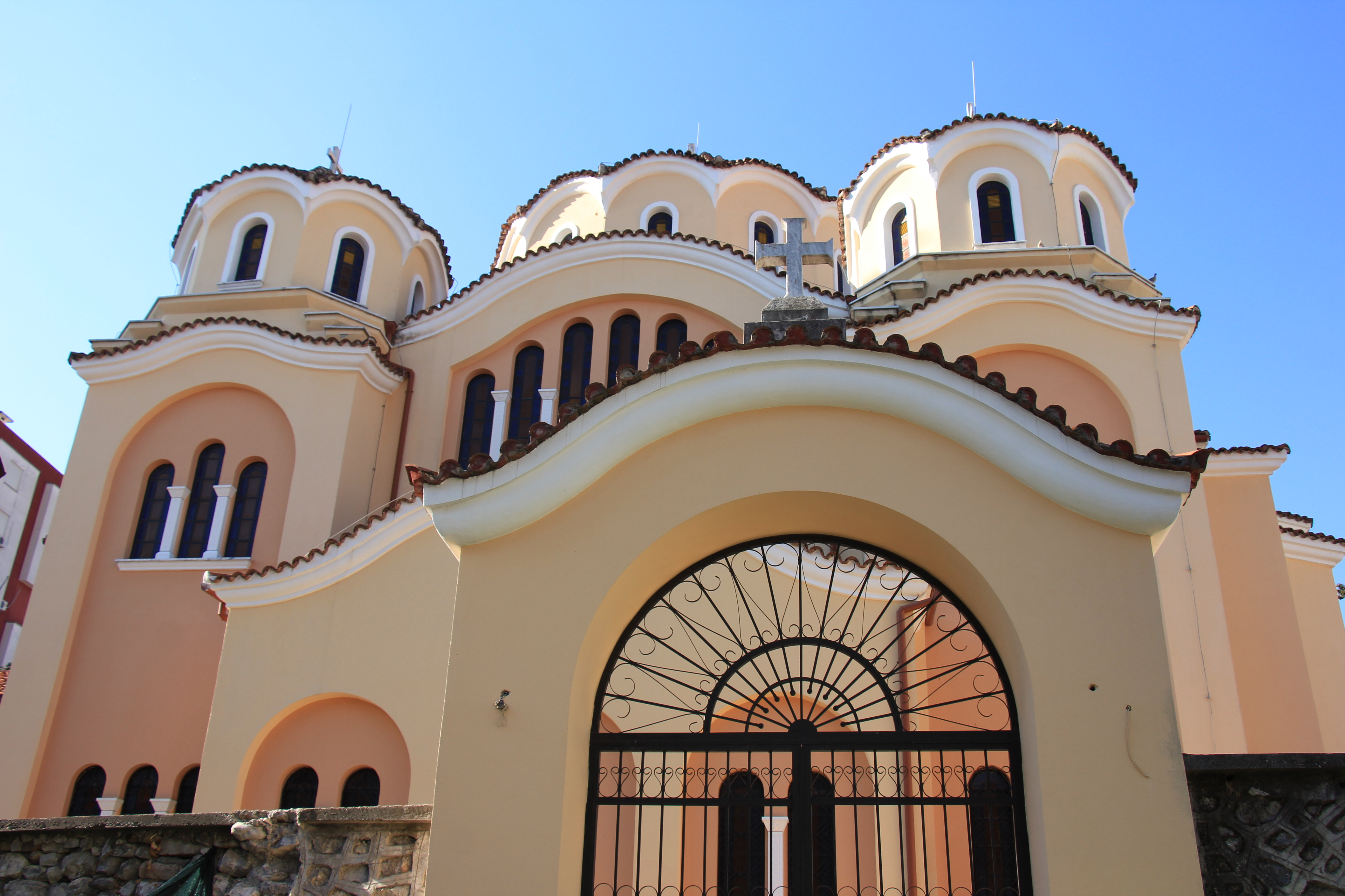 Kisha orthodokse e Shkodres